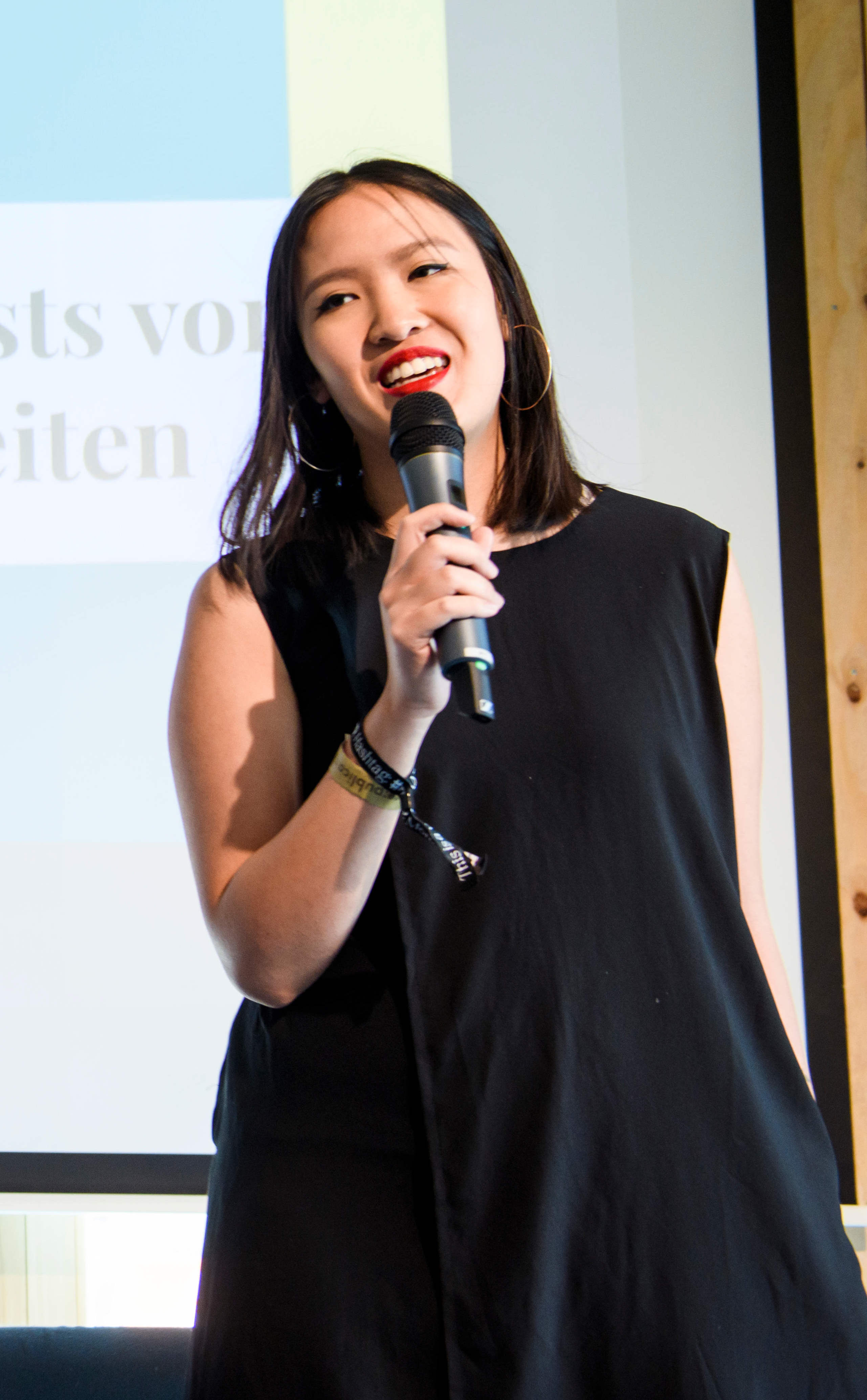 Talk: Podcasten von und für Minderheiten - Zehn Thesen Speaker: Vanessa Vu, Minh Thu Trau